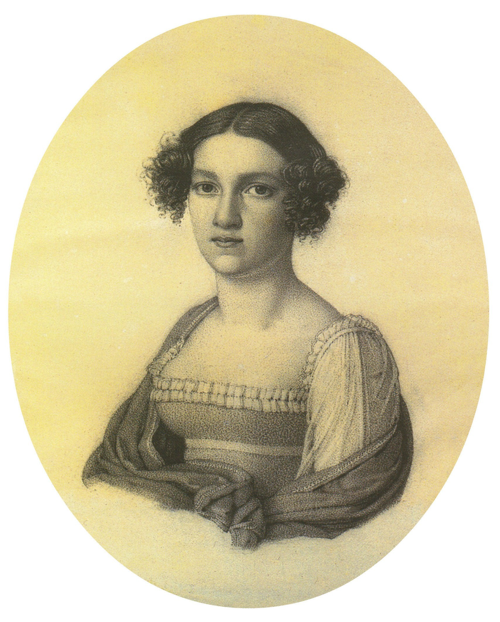 София Евстафьевна Батюшкова, ур. Пальменбах (1781—1839)